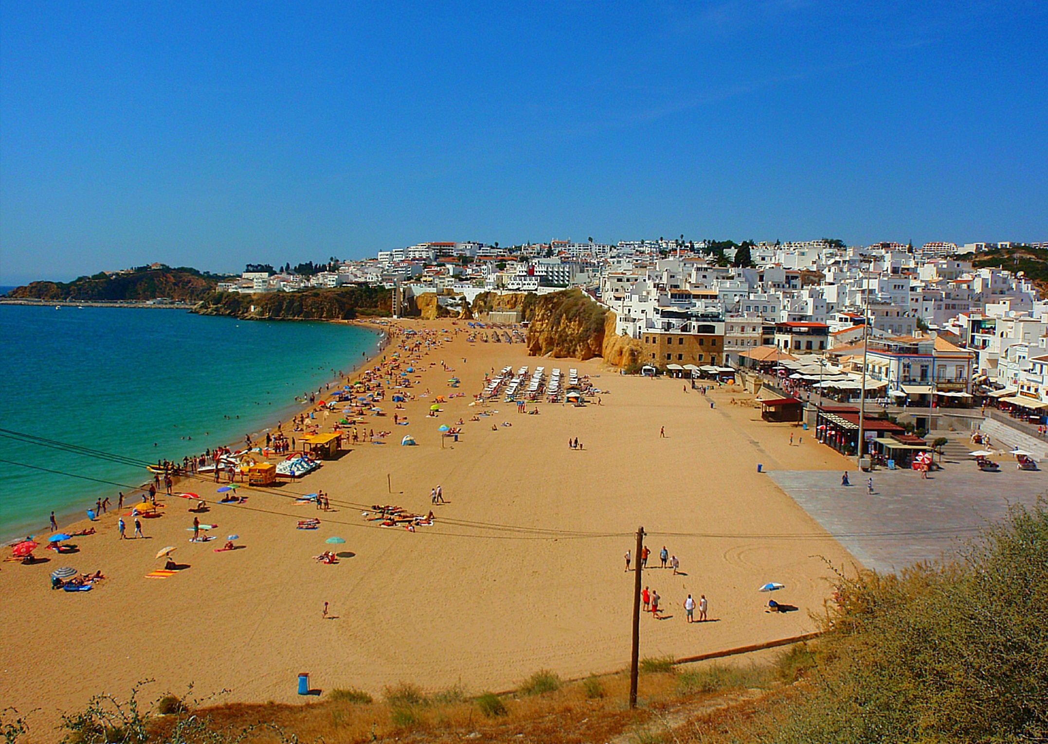 Albufeira (Portugal)